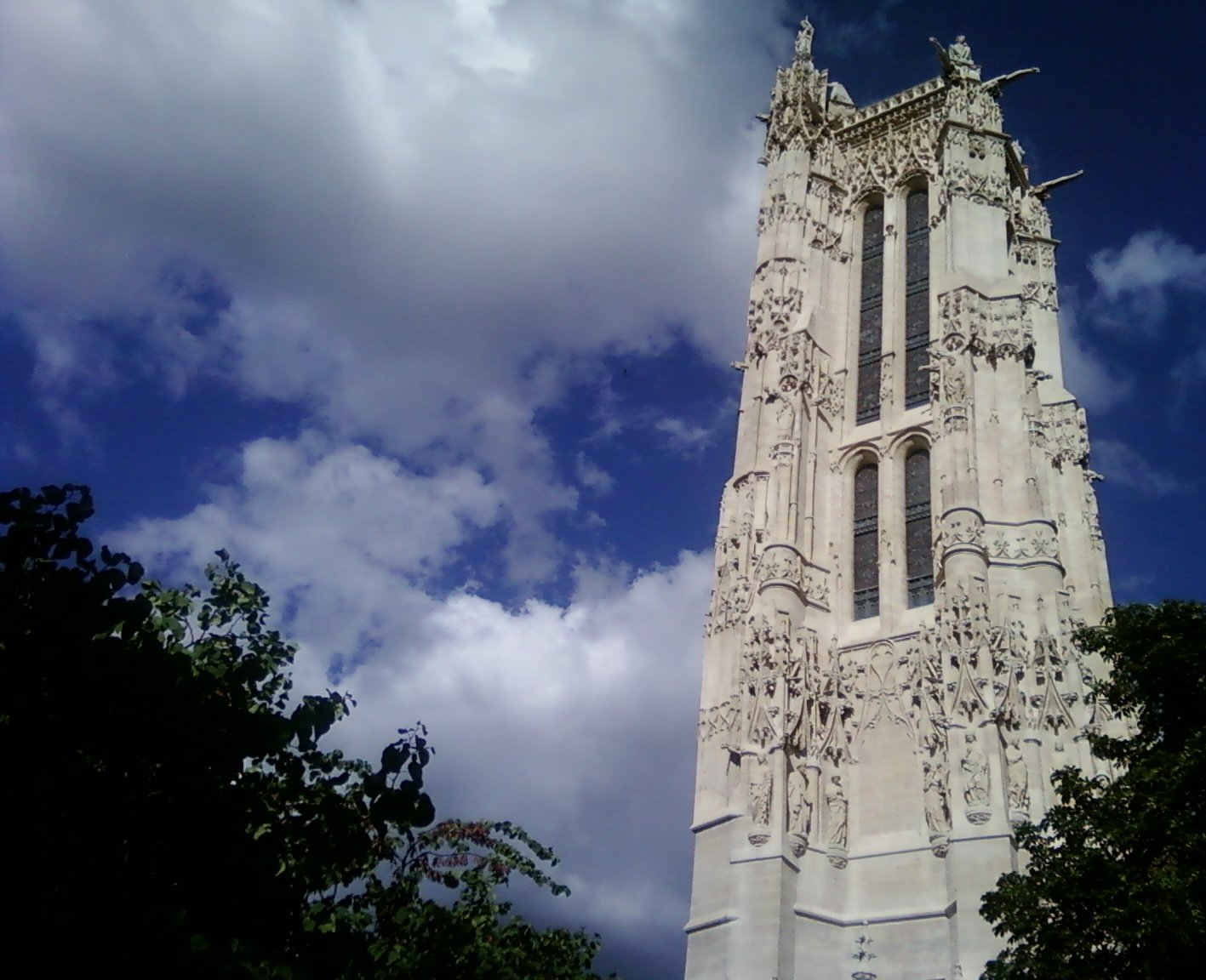 Paris, tour Saint-Jacques, après la restauration